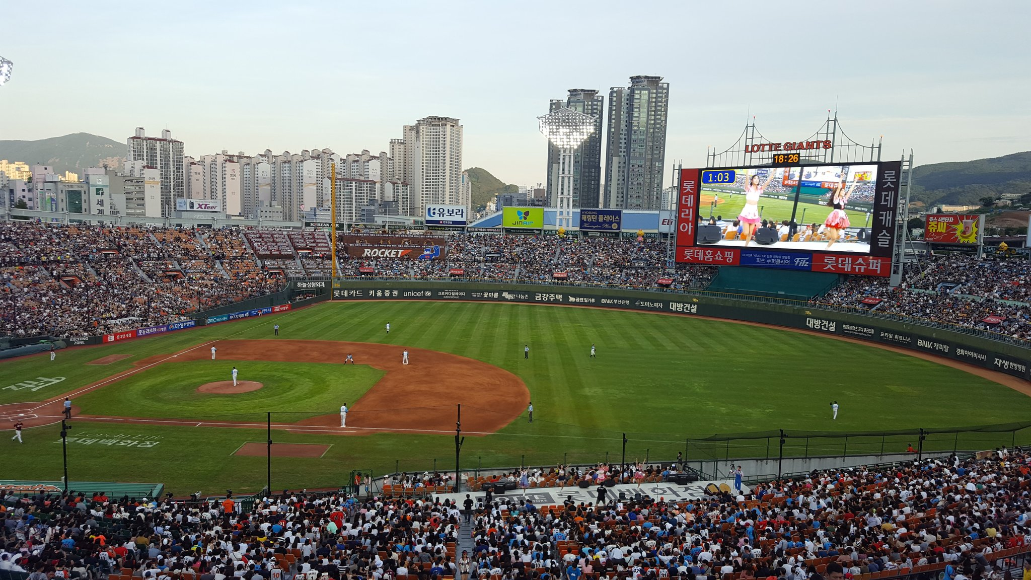 Lotte Giants in Sajik Baseball Stadium on August 26, 2017.